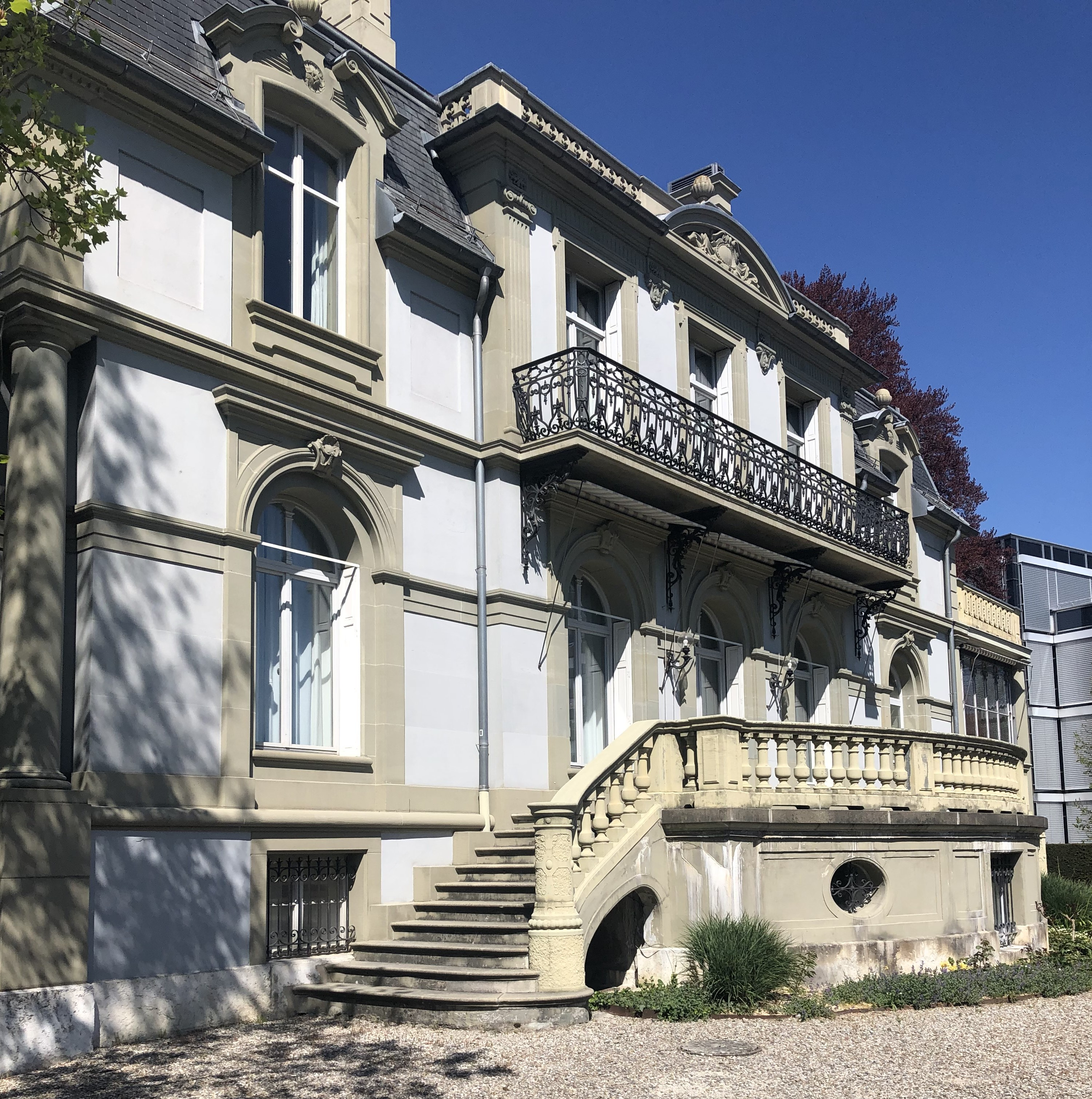 Haus der Universität